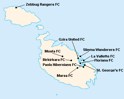 Répartition des clubs en First Division Maltaise 1974-1975.